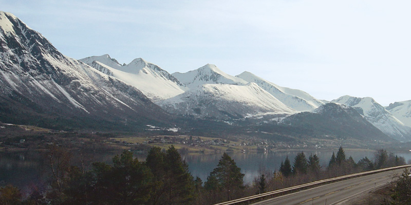 Isfjorden